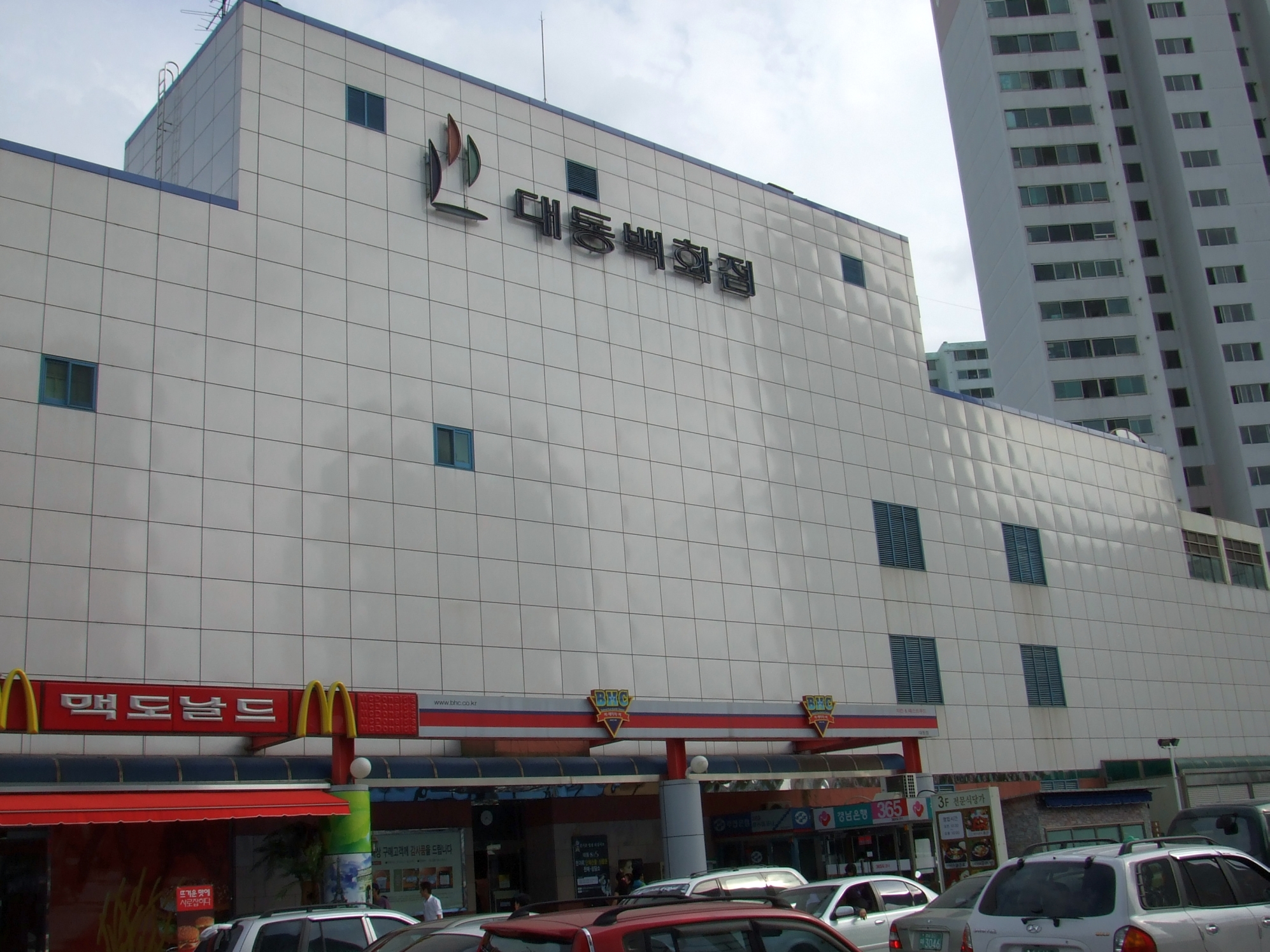 대동메디칼 건물(이 사진에 대동메디칼 건물 일부가 같이 촬영되어 있습니다) 쪽에서 바라본 대동백화점 (대동백화점 건물의 서쪽)